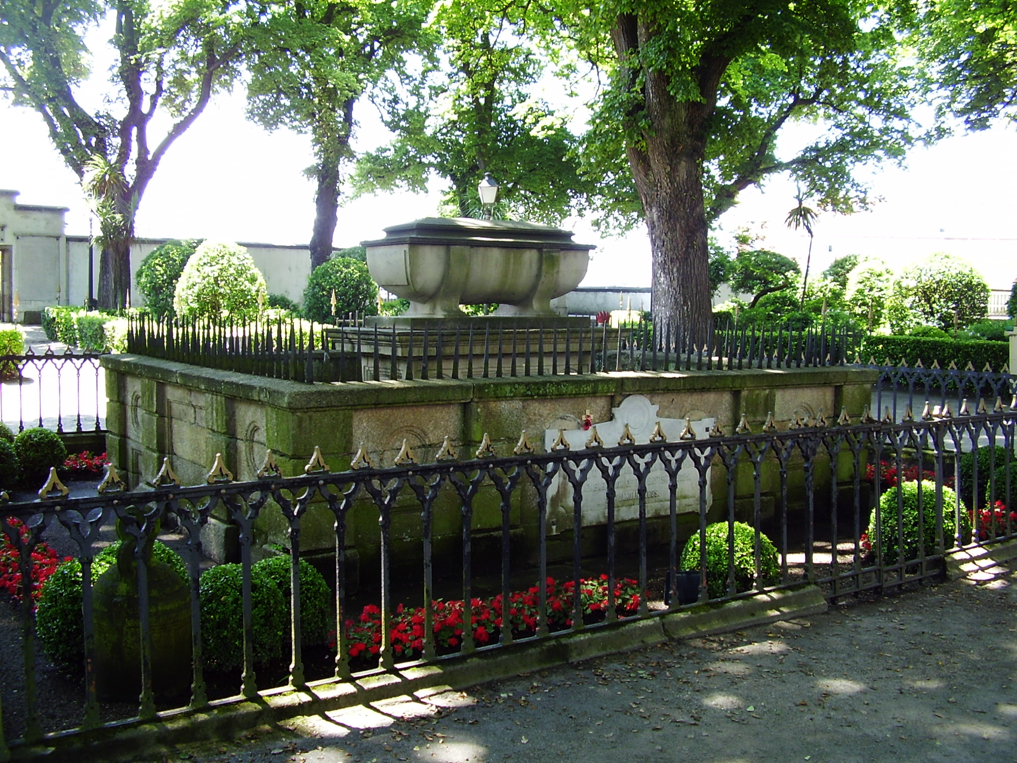 Tumba de Sir John Moore, en el Jardín de San Carlos, La Coruña